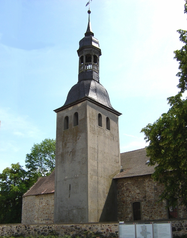 Pfarrkirche in Leitzkau (Sachsen-Anhalt)